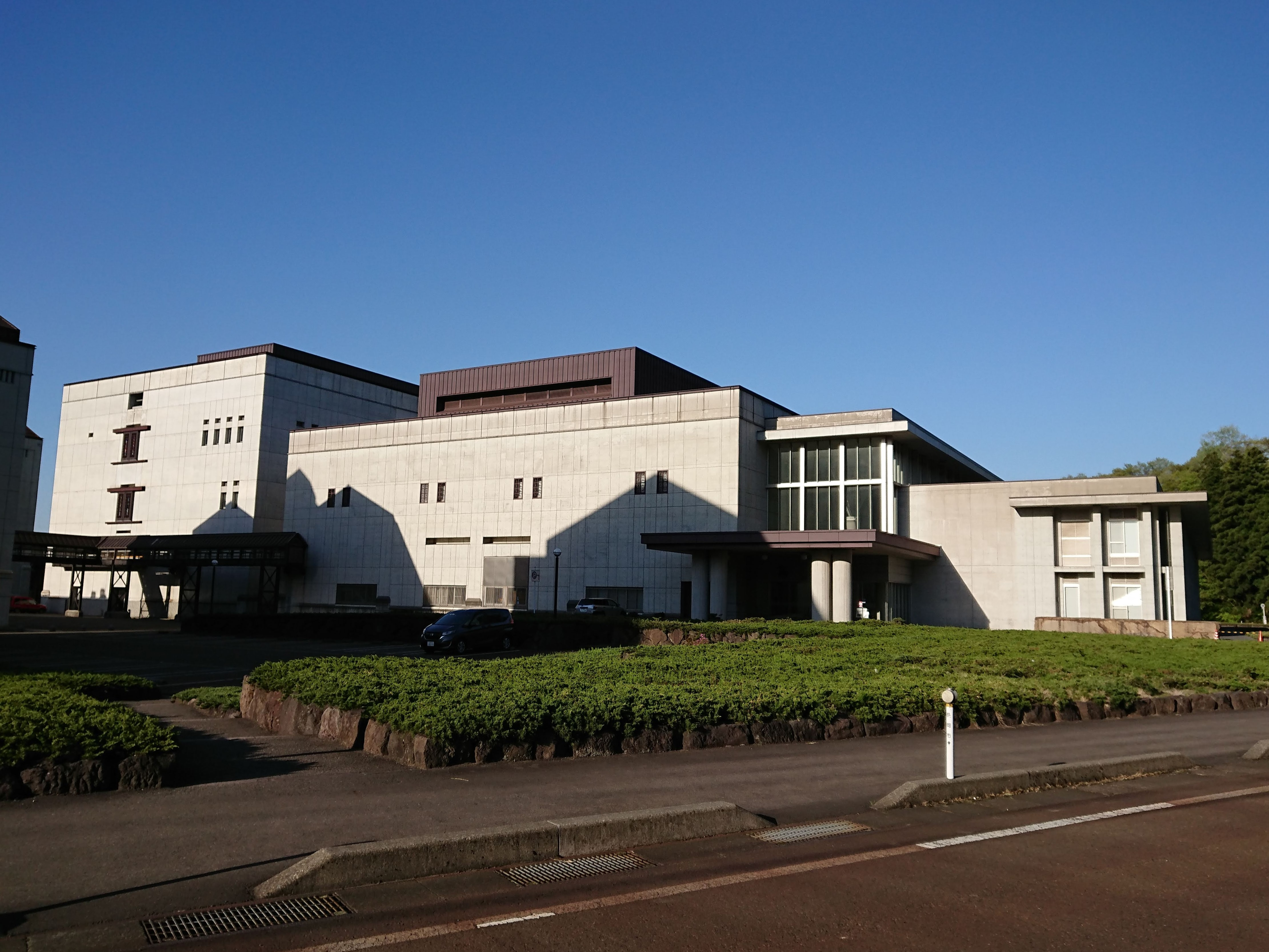 朝日酒造の本社外観